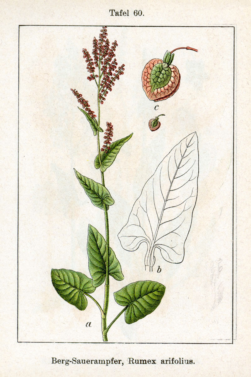 Rumex arifolius All., syn. Rumex alpestris Jacq. : Rumex alpestris Jacq., syn. Rumex arifolius All., nom. ill. Original Description Berg-Sauerampfer, Rumex arifolius